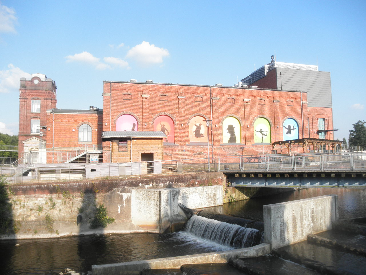 rok- kaj popmuzika muzeo Rock’n’popmuseum en Gronau, Vestfalio